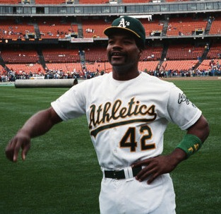 Oakland Athletics center fielder Dave Henderson.